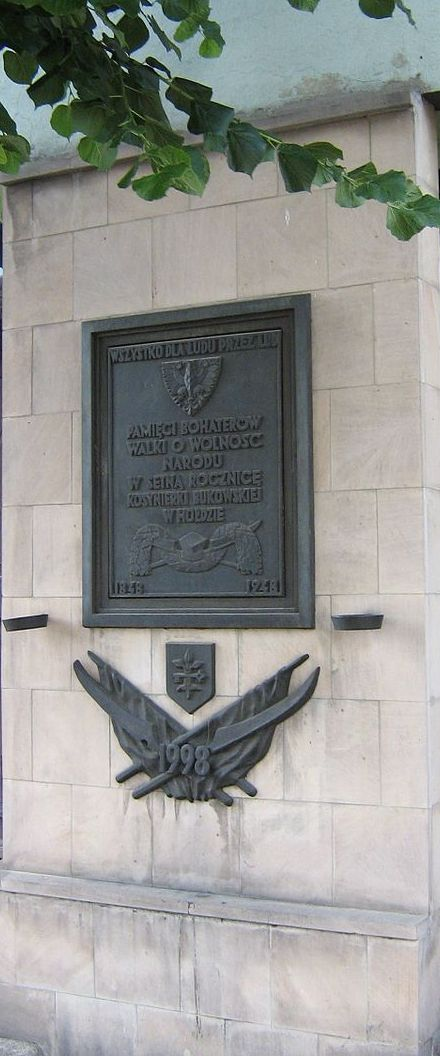 Tablica ku czci bohaterów Wiosny Ludów w Buku (Wielkopolskie)